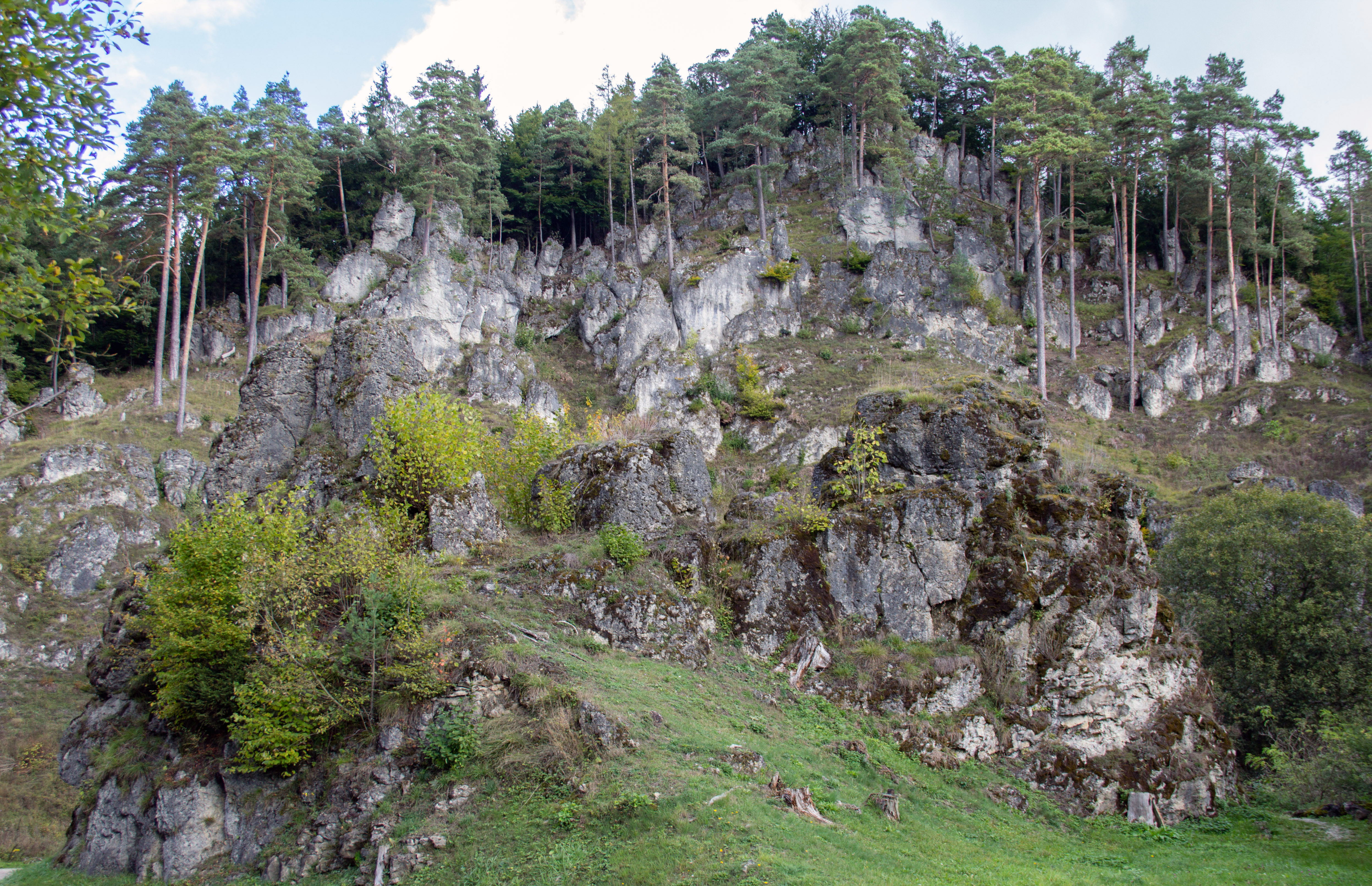 Felsgruppe Alte Küchen, Obertrubach, Geotop und Naturdenkmal